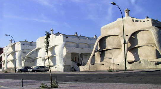 Zaragoza Publos 2001